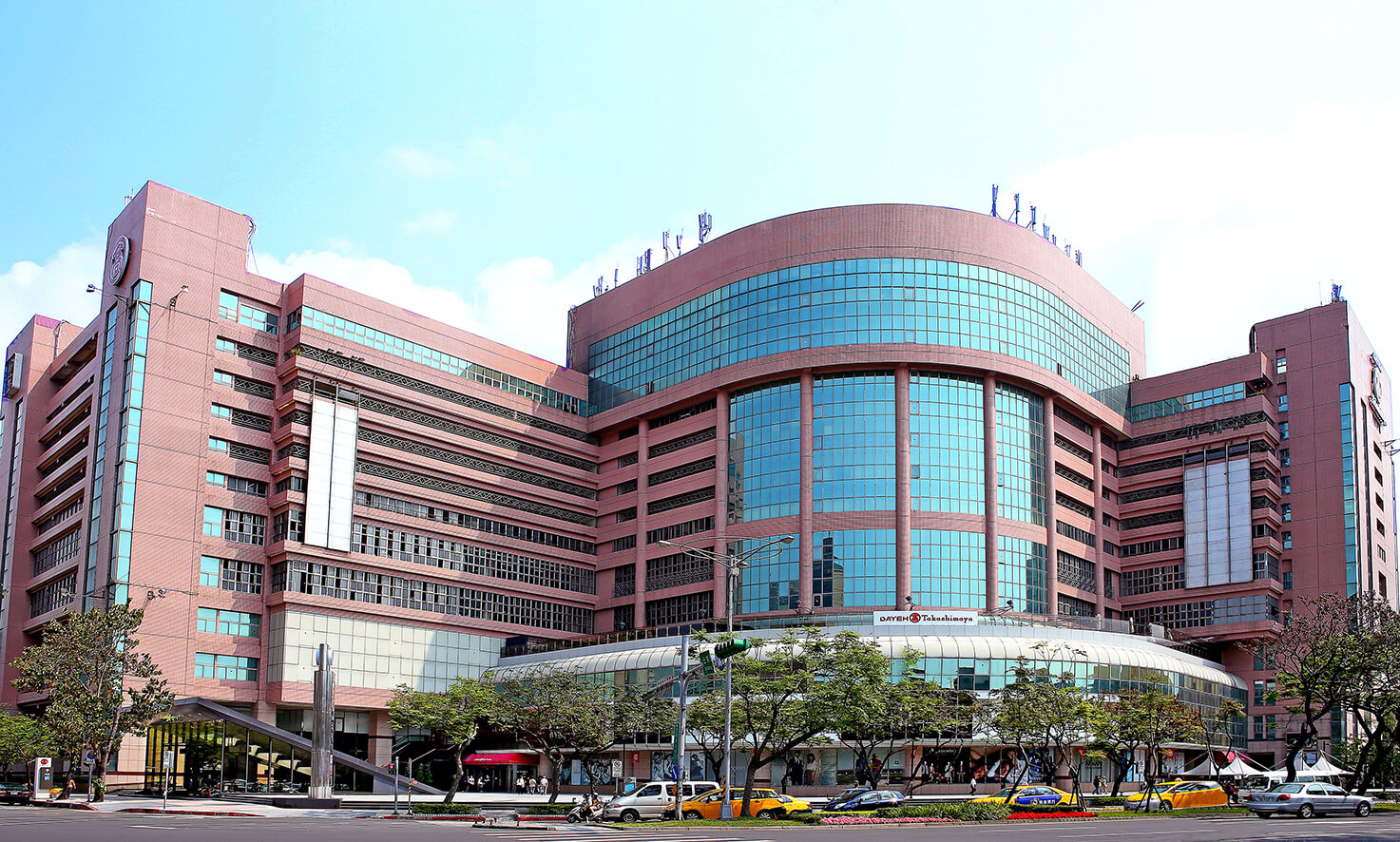 大葉高島屋店景